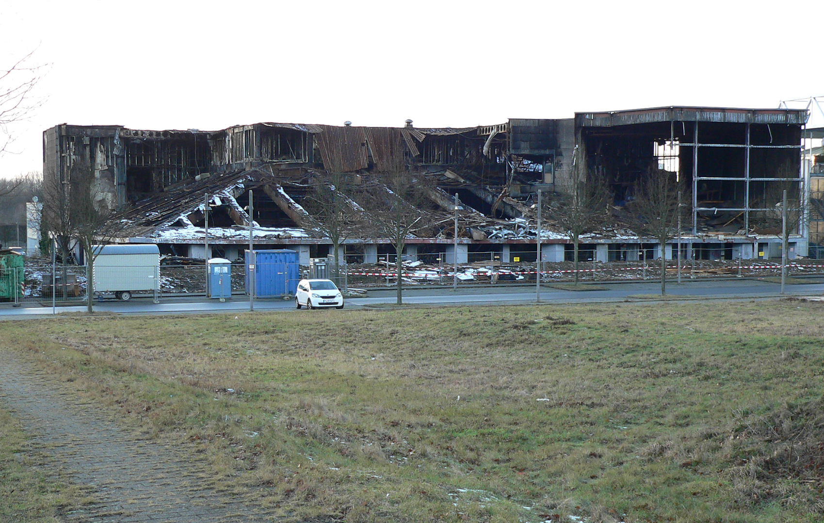 2016 Ausgebrannter spanischer Pavillon der Expo 2000 im Abriss 2017